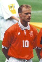 Dennis Bergkamp, Jordi Cruyff, Richard Witsche, Winston Bogarde